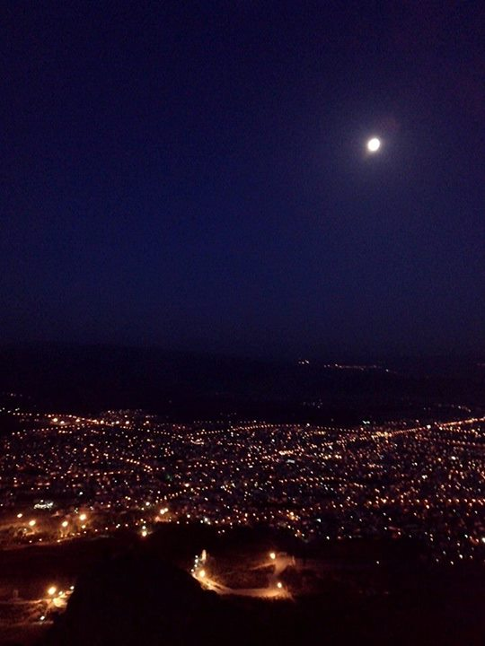 ملایر در شب